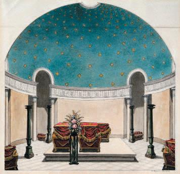 Rudolph Suhrlandt: Der Innenraum des Mausoleums der Helene Paulowna, 1842 Aquarell, 28, 0 x 31,0 cm Bezeichnet u. r.: R. Suhrlandt 1842 Inv. Nr. 957 Hz SMS